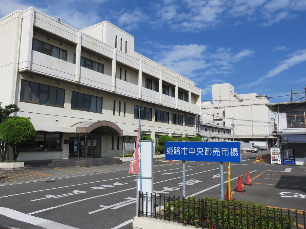 姫路市中央卸売市場